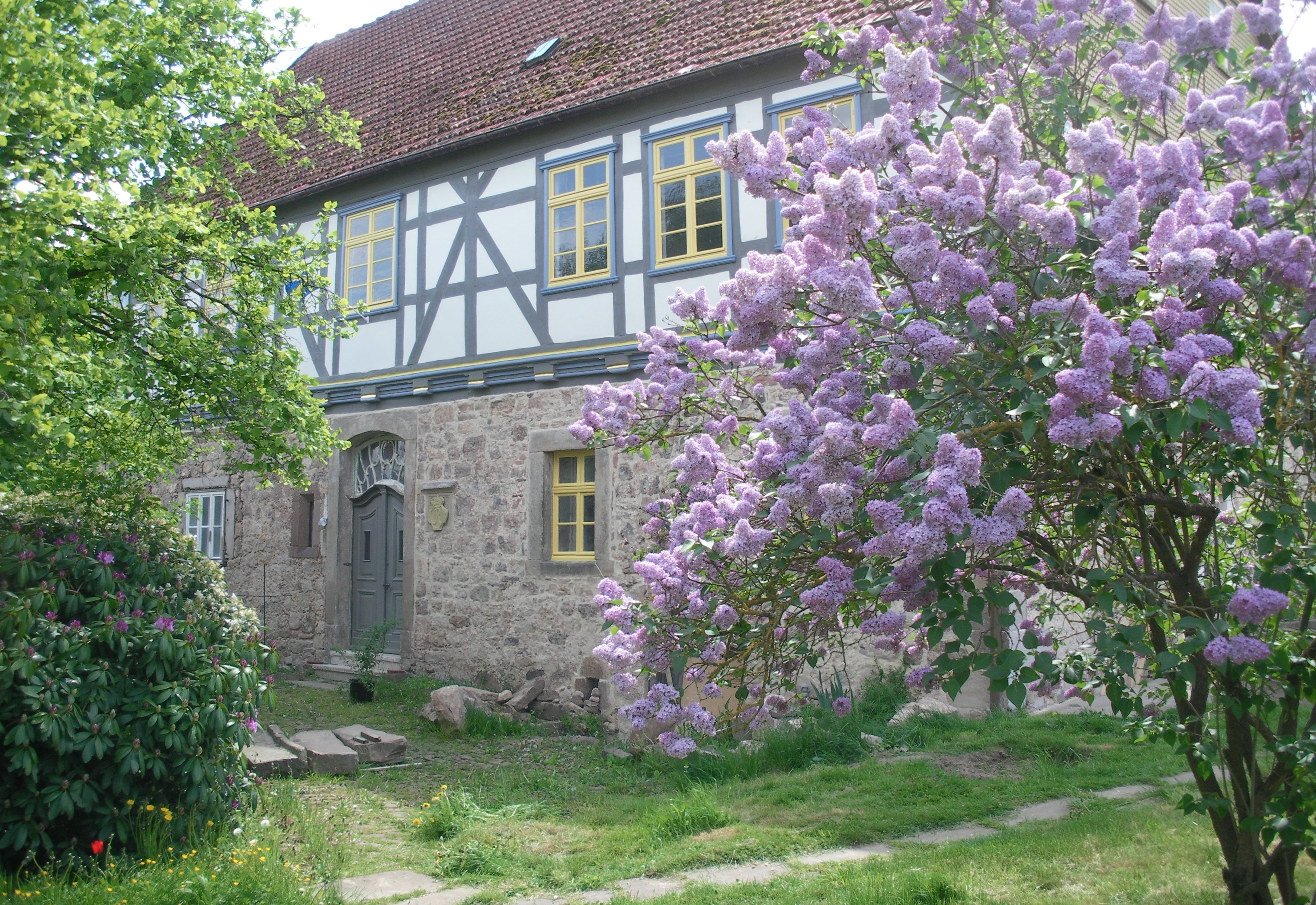 Jagdschloss Holzheim in Haunetal-Holzheim, Hessen, Regierungsbezirk Kassel, Landkreis Hersfeld-Rotenburg